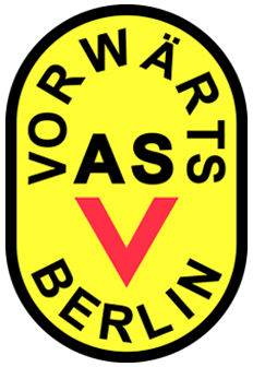 Logo des ASK Vorwärts Berlin